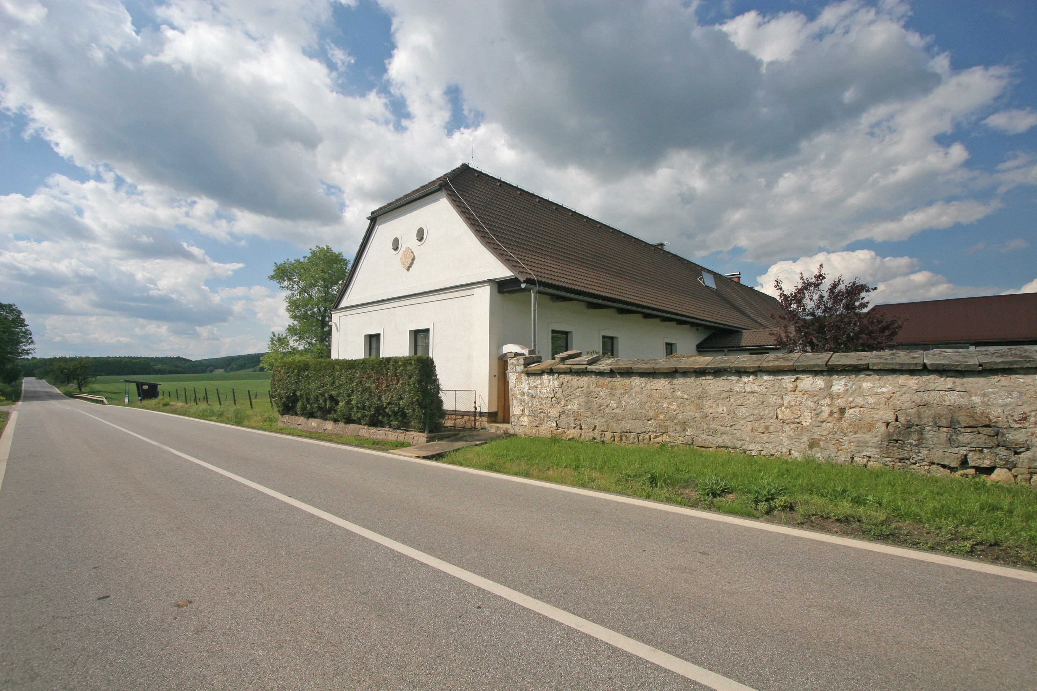 Tetín - Falgovský dvůr